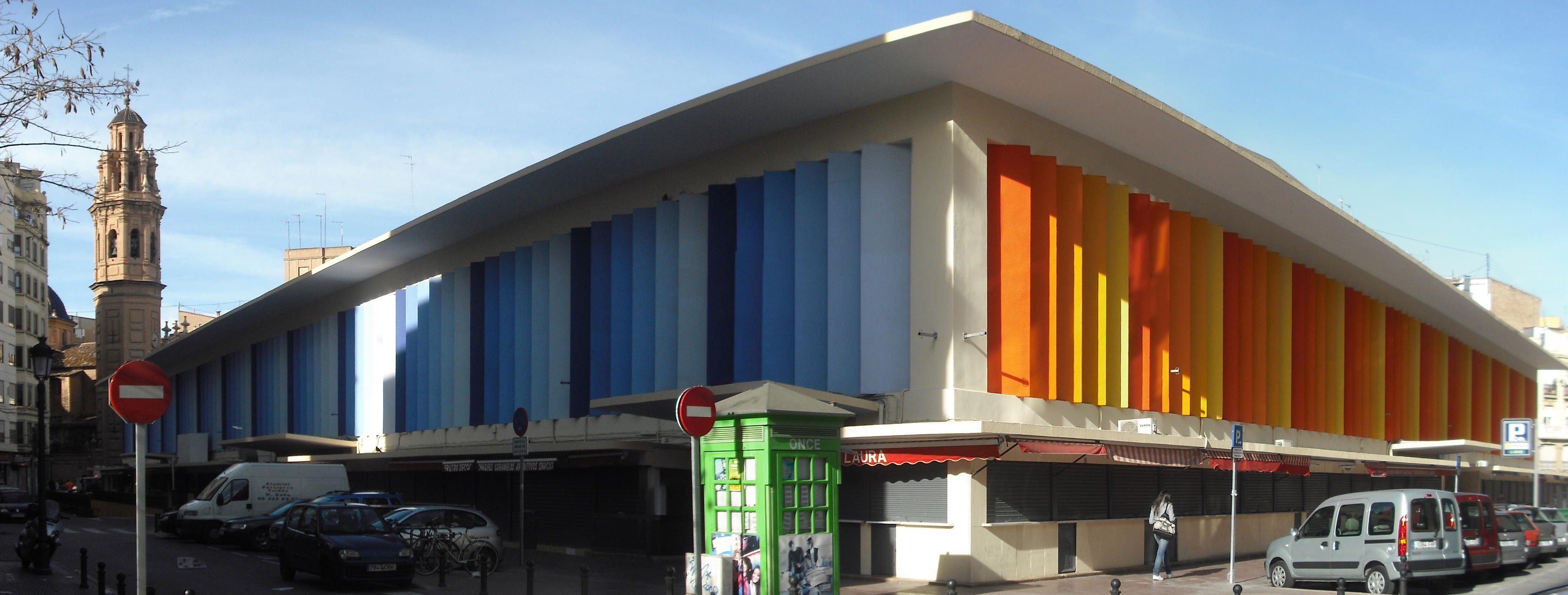 Mercado de Ruzafa (Valencia), desde el Carrer de Vivons, con la torre de San Valero al fondo.